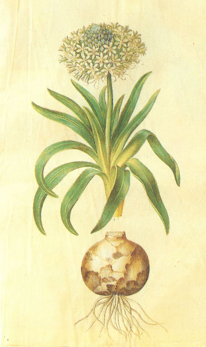 Scilla Peruviana, gouache on vellum, in: Gottorfer Codex